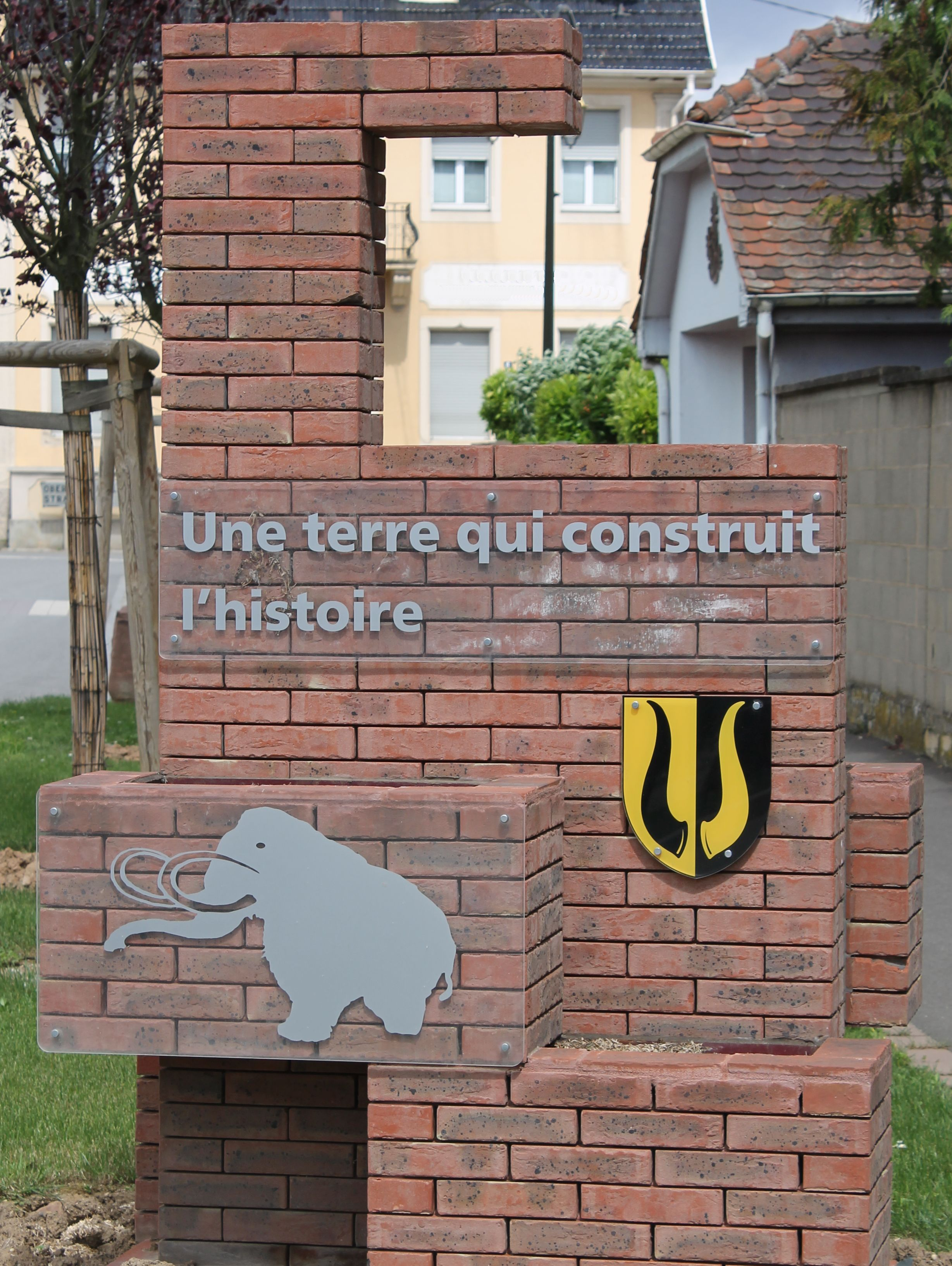 Motto und Logo von Achenheim